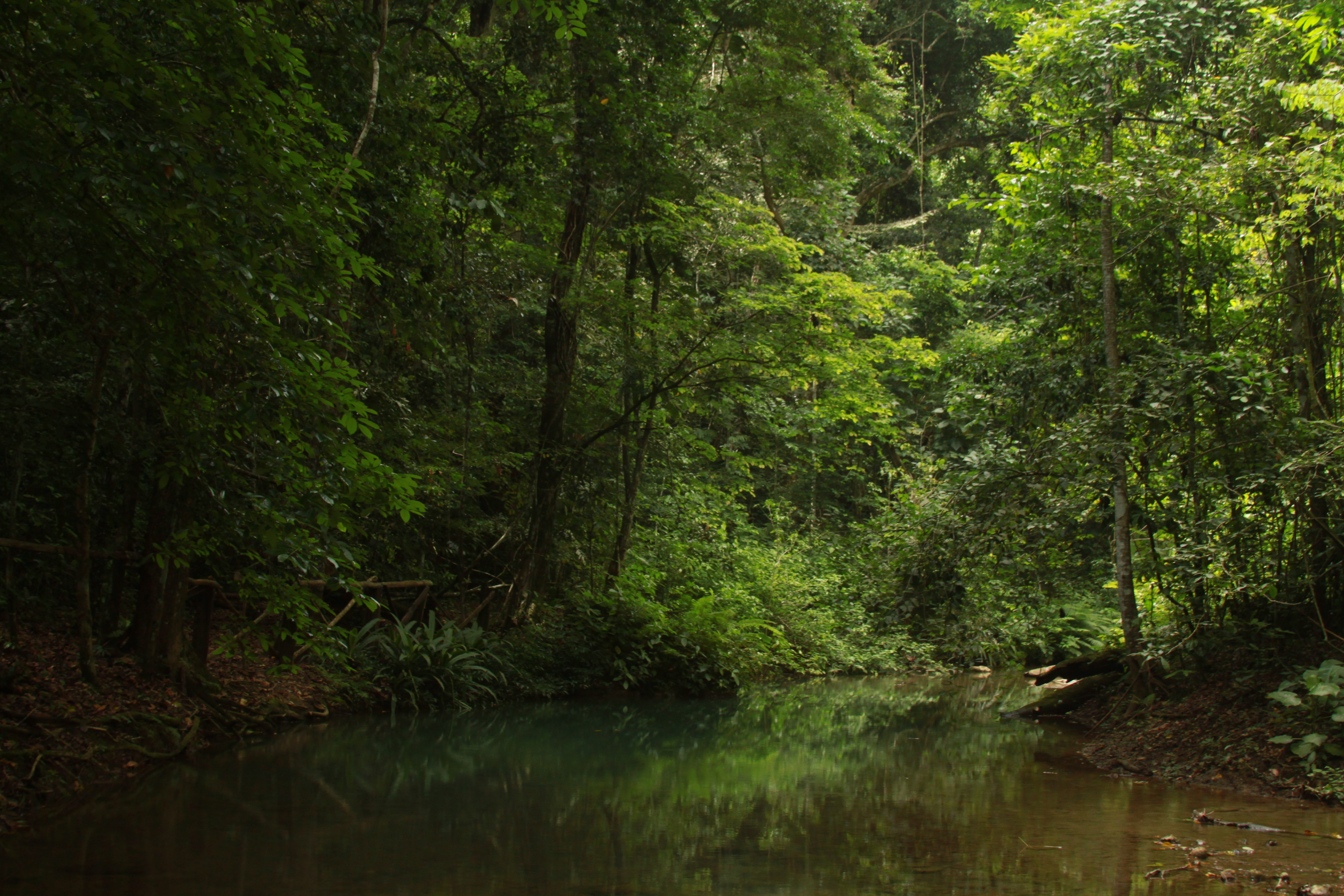 Manantial de la Cueva de la Quebrada del Toro